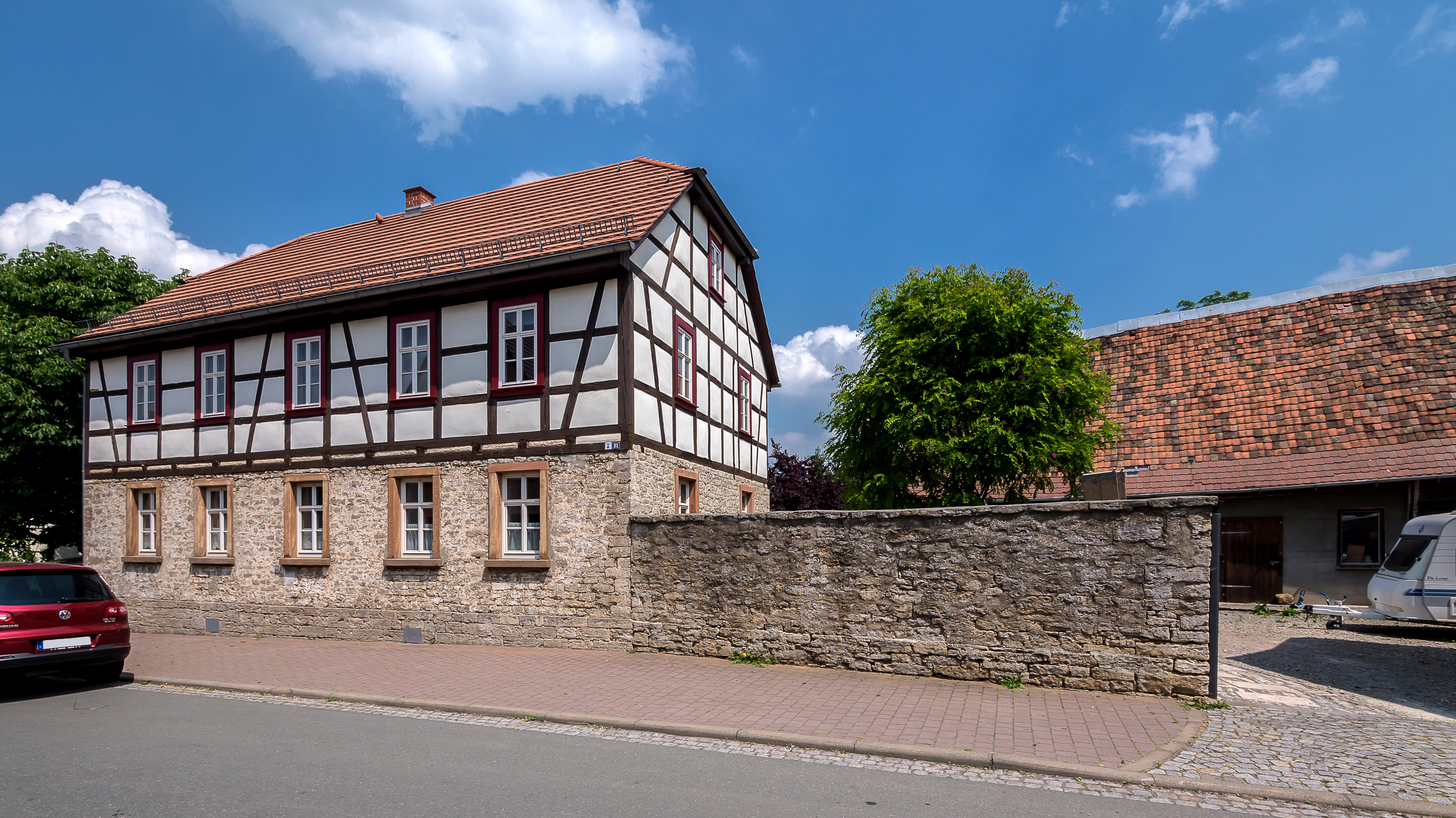 Nohra Herrenstraße 21 Gehöft